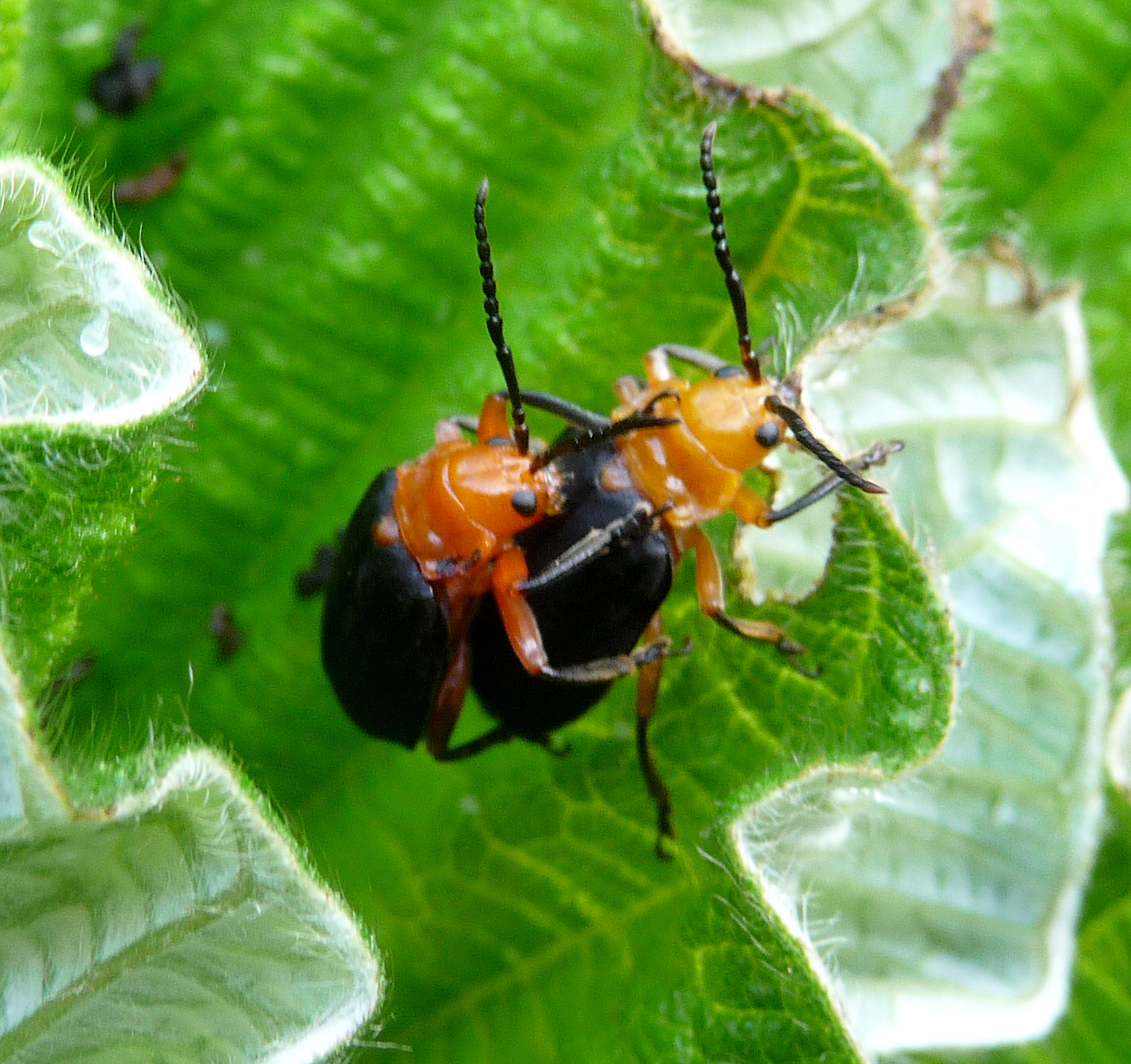 beetle love!